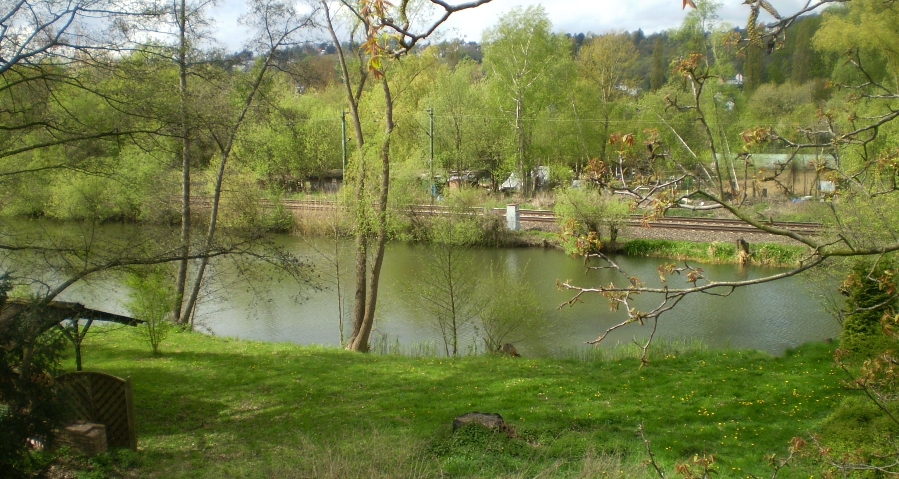 Weiher im Maar östlich der Bahnstrecke, Rheinbreitbach